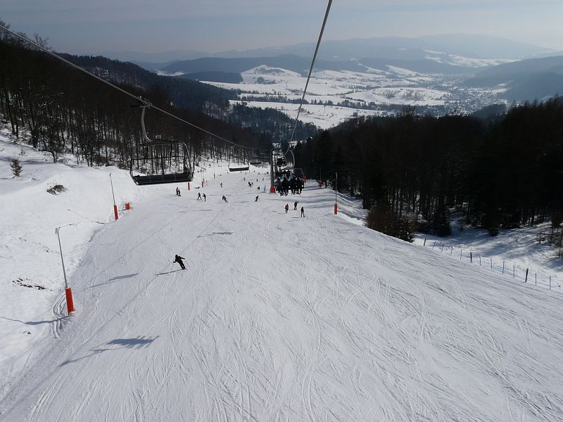 Dwie Doliny Muszyna Szczawnik